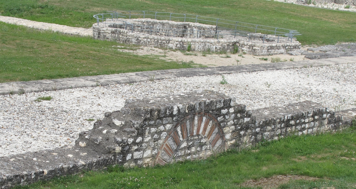 Soupirail à Aquis Segeste, France